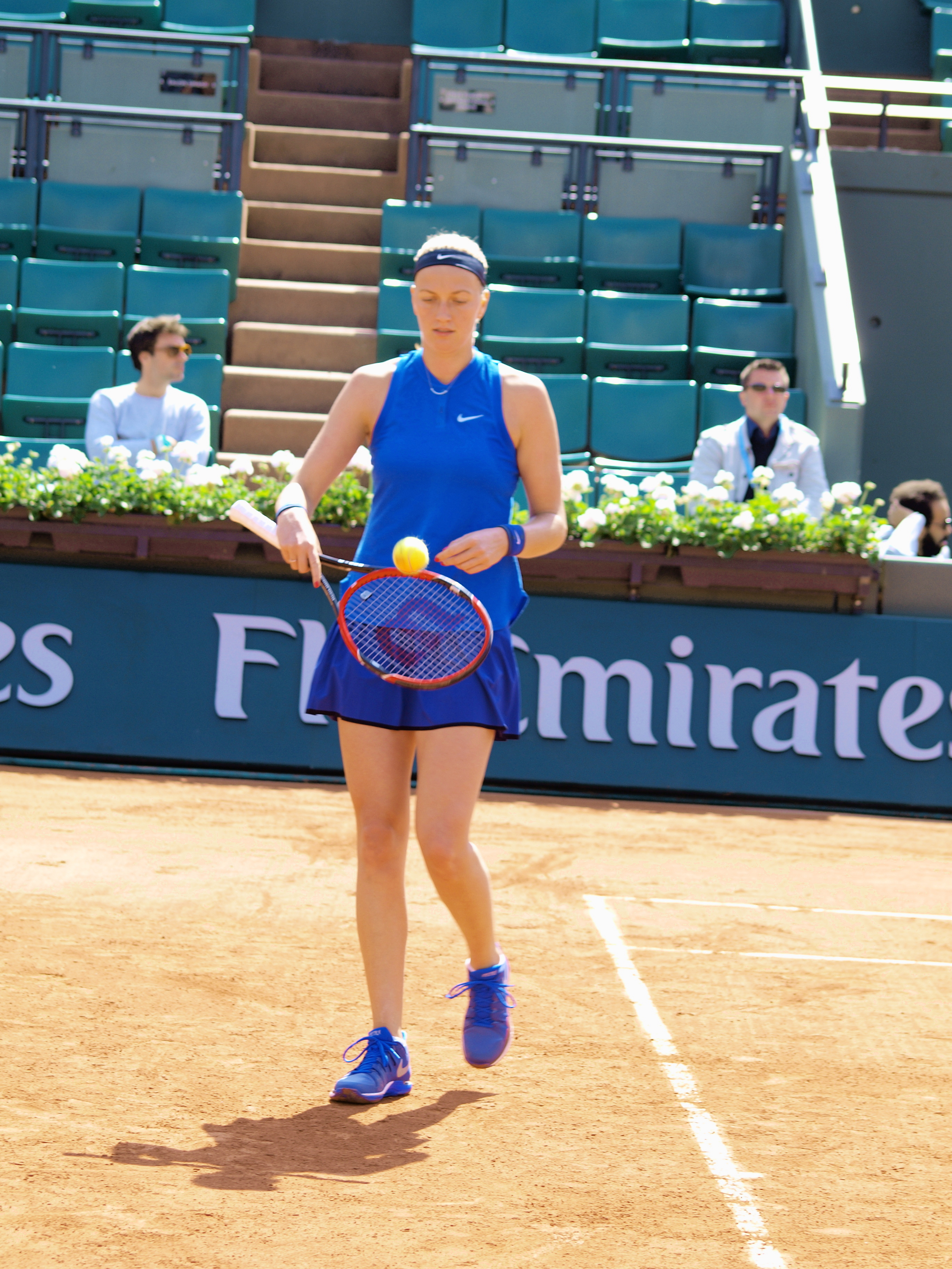 La joueuse de tennis tchèque Petra Kvitová, lors des internationaux de France de tennis , sur le stade Roland Garros, à Paris, le 25 mai 2016, dans son duel sportif contre la joueuse tawaïnaise Hsieh Su-Wei.